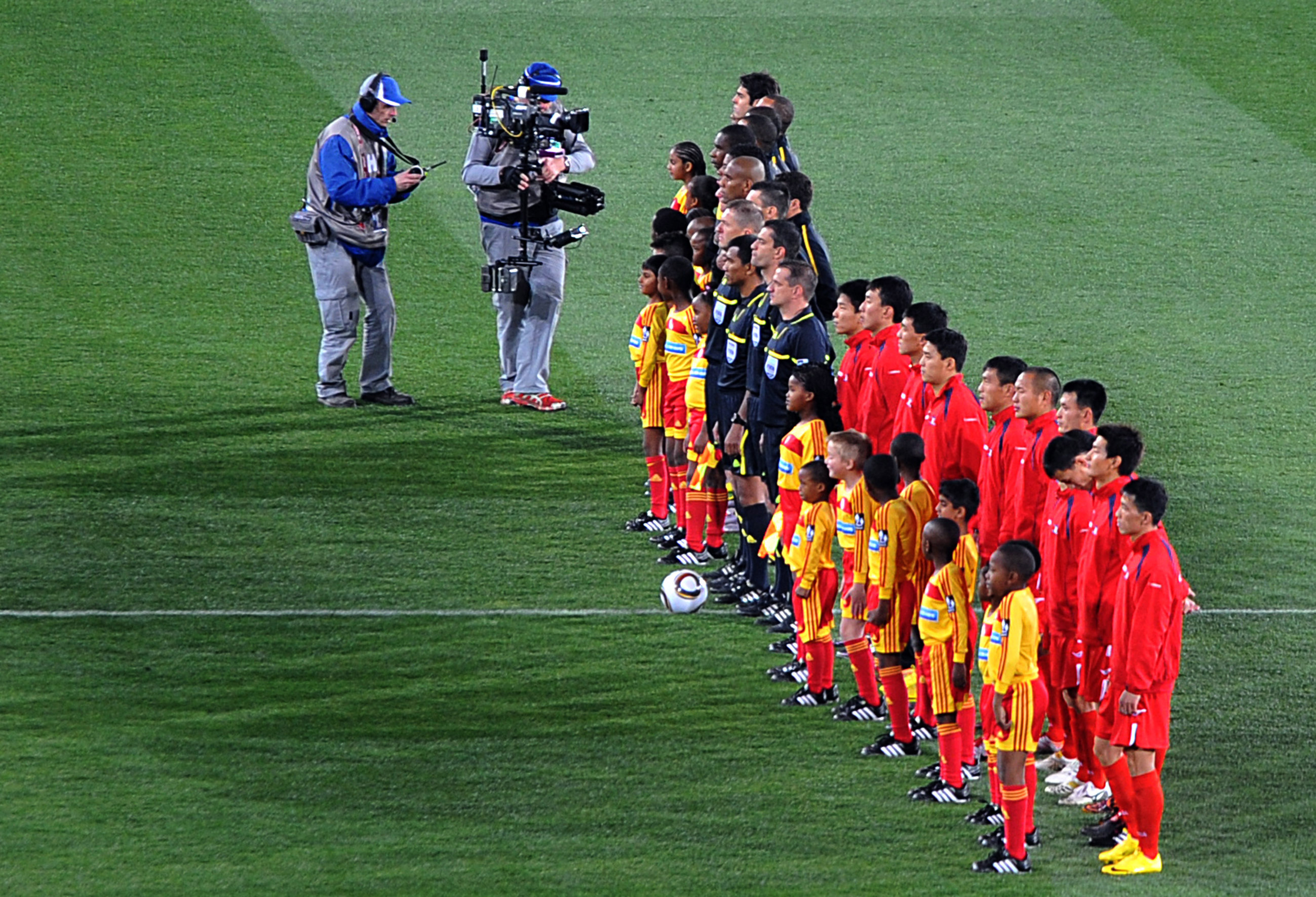 Joanesburgo - Seleção brasileira estreia na Copa do Mundo de 2010 contra a Coreia do Norte.